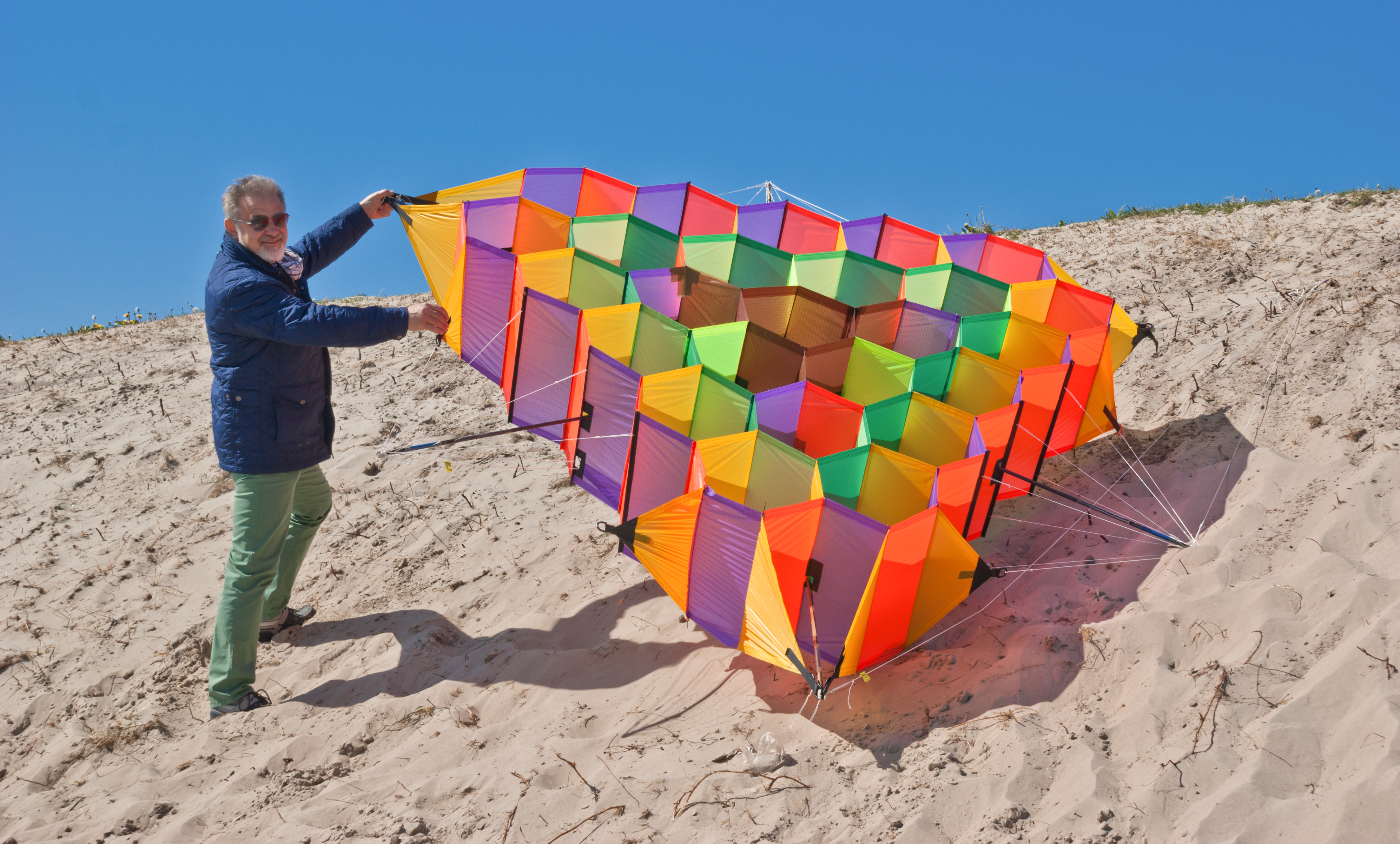 Latawiec